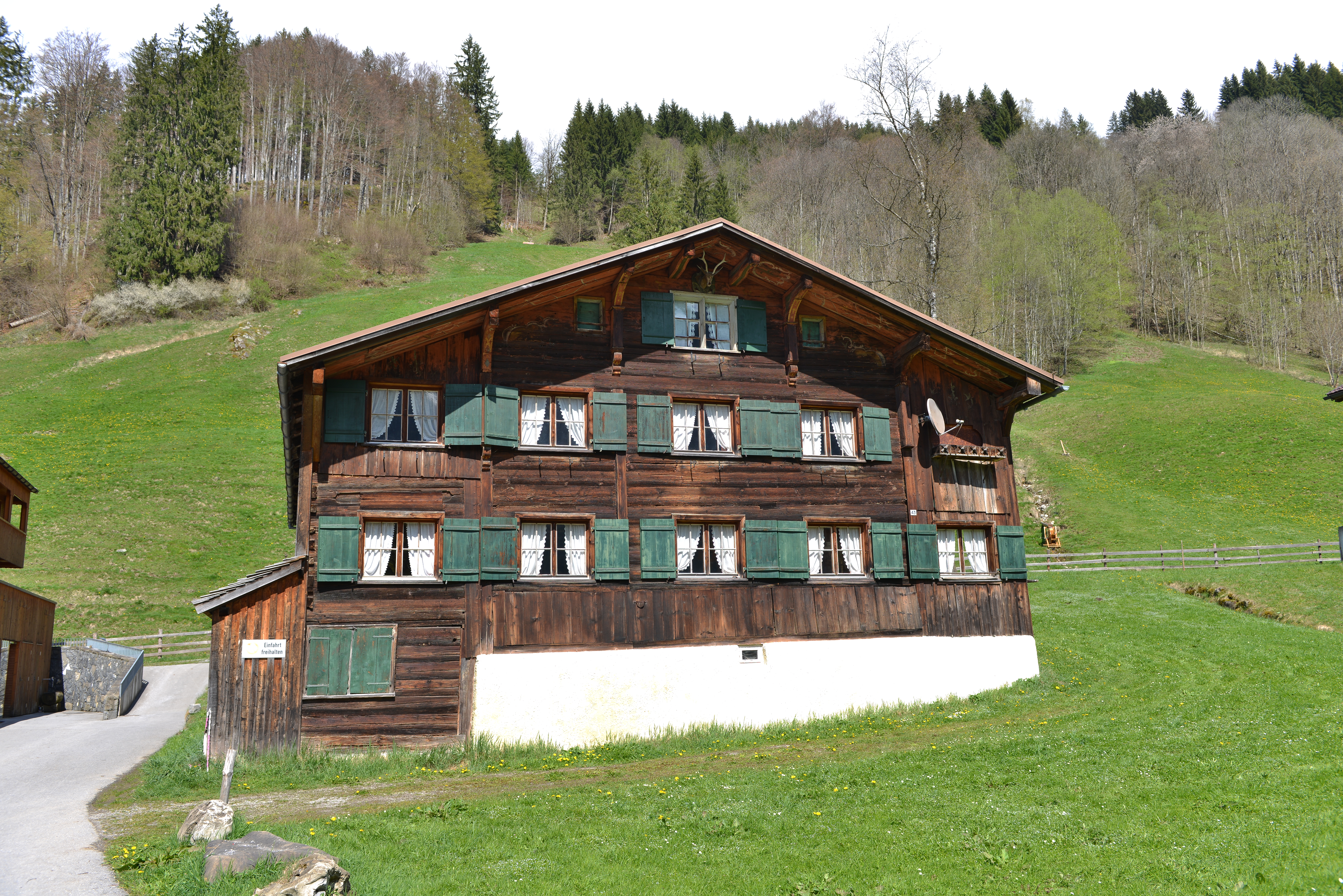 aus dem DEHIO Vorarlberg 1983: Schoppernau, BAUERNHÖFE: Großteils spätes 18. und 1.Hälfte 19. Jhs. beziehungsweise im 19. Jh. ausgbaut, die Wohnteile verschindelte Blockbauten mit 4- bis 6achsigen Giebelfronten und traufseitig offenem Schopf. Ensembles bilden im Ortskern Nr. 12-19 (Nr.14 mit breiter 7achsiger Giebelfront, Ende des 19 Jhs. ausgebaut) und Nr.25,26,28; am östlichen Dorfrand Nr. 62-65 und Nr.67. Nr.43: Einhof, Wohnteil bezeichnet 1786, Blockbau auf Kellersockel, zum Teil mit Bretterschirm, traufseitig offener Schopf, Pfettenunterzüge, Ochsenblutanstrich und Rokokomalerei.